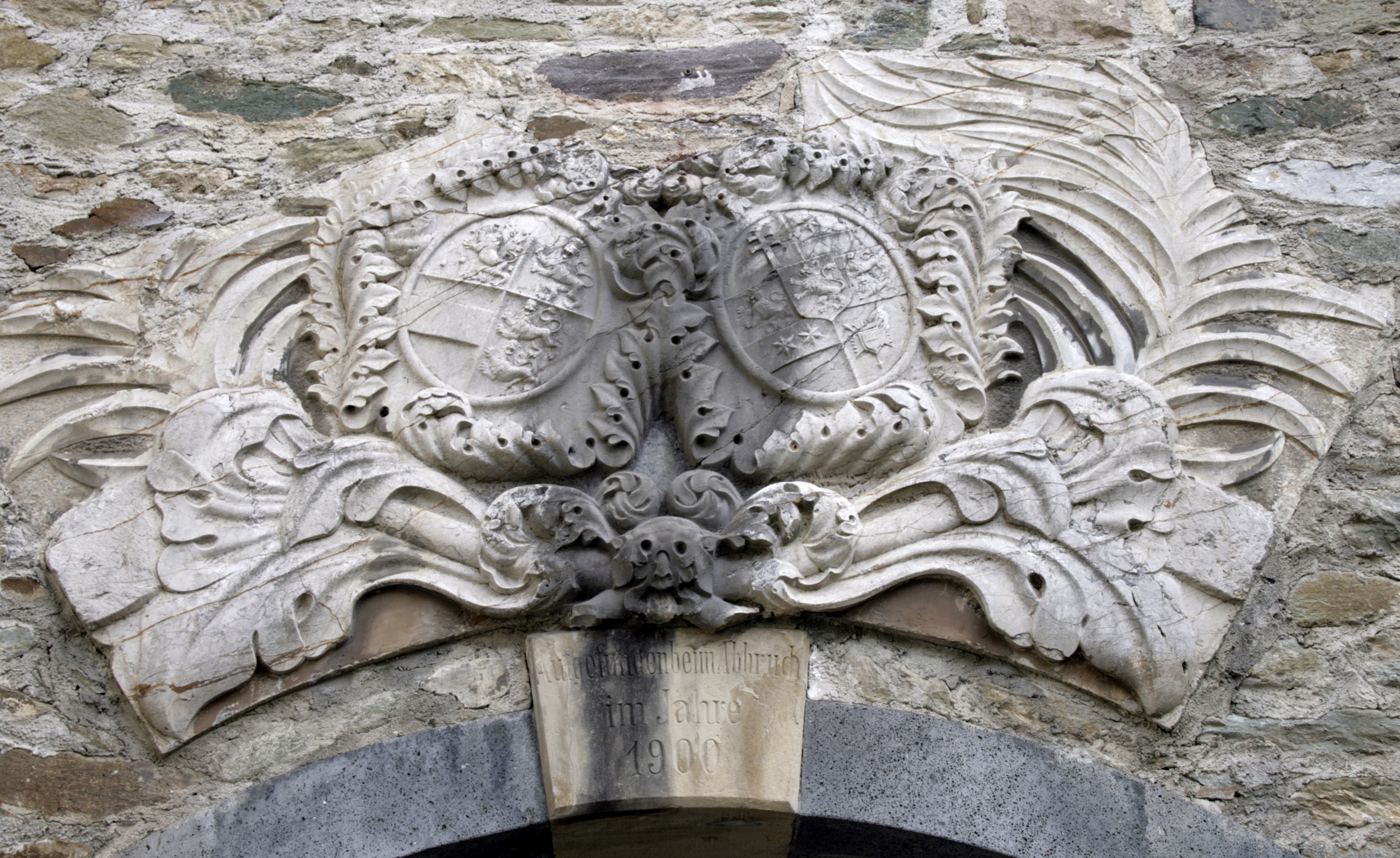 Schloss Hadamar, Wappen von Franz Alexander von Nassau-Hadamar, Deutschland